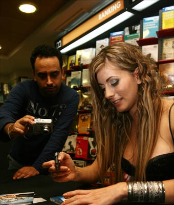 catalina palacios firmando discos